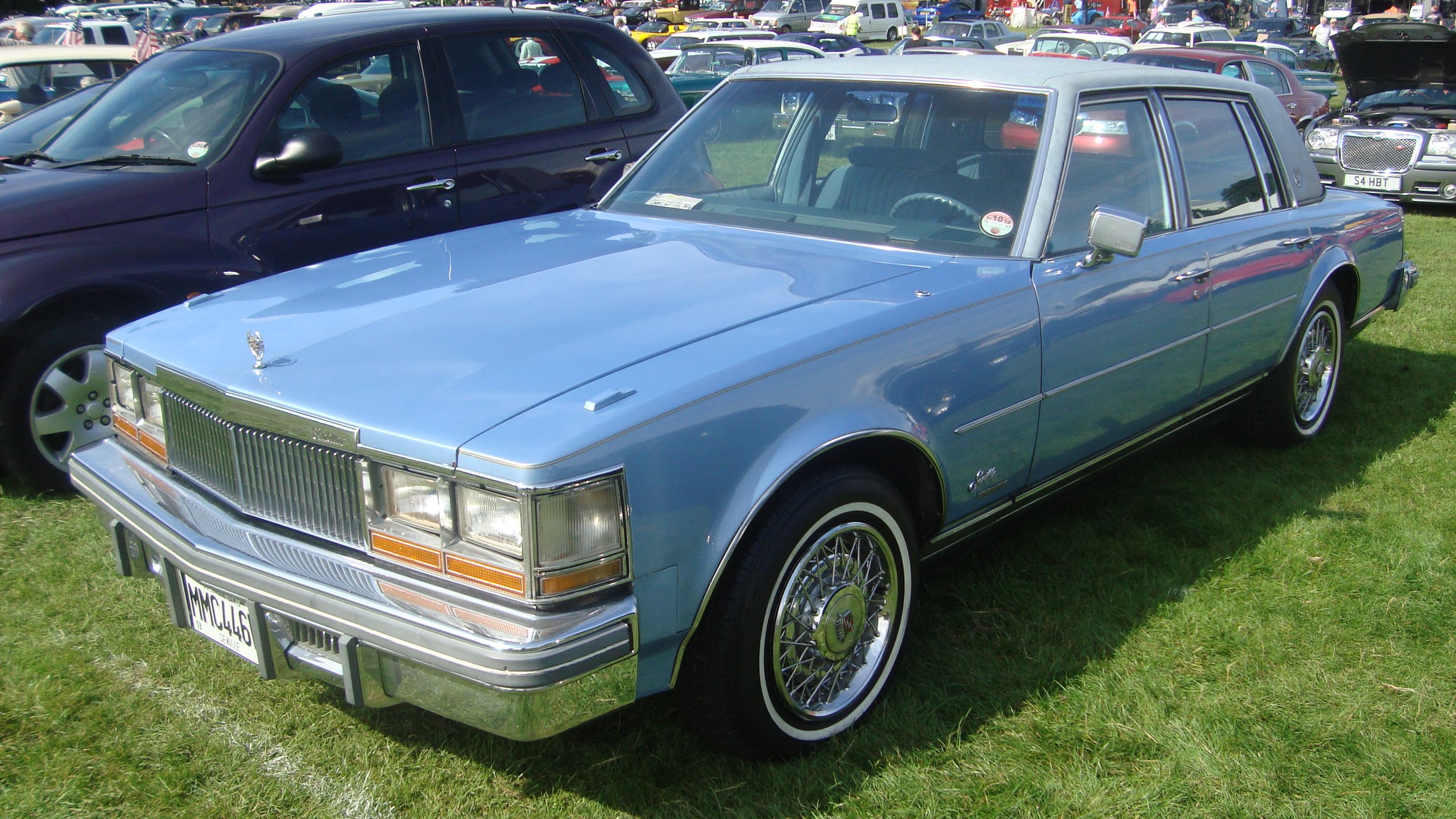 Cadillac Seville